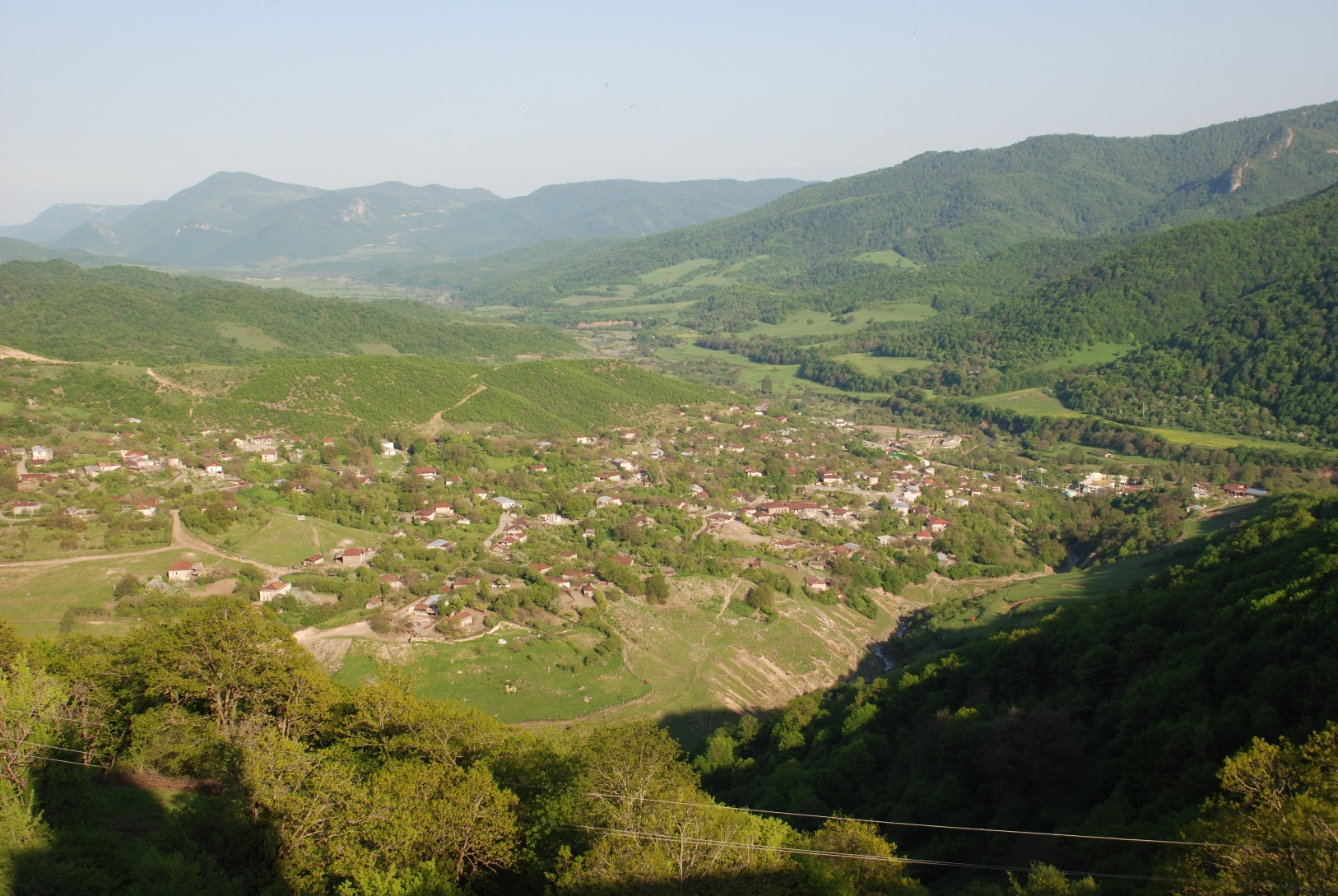 Päysage du haut Karabagh